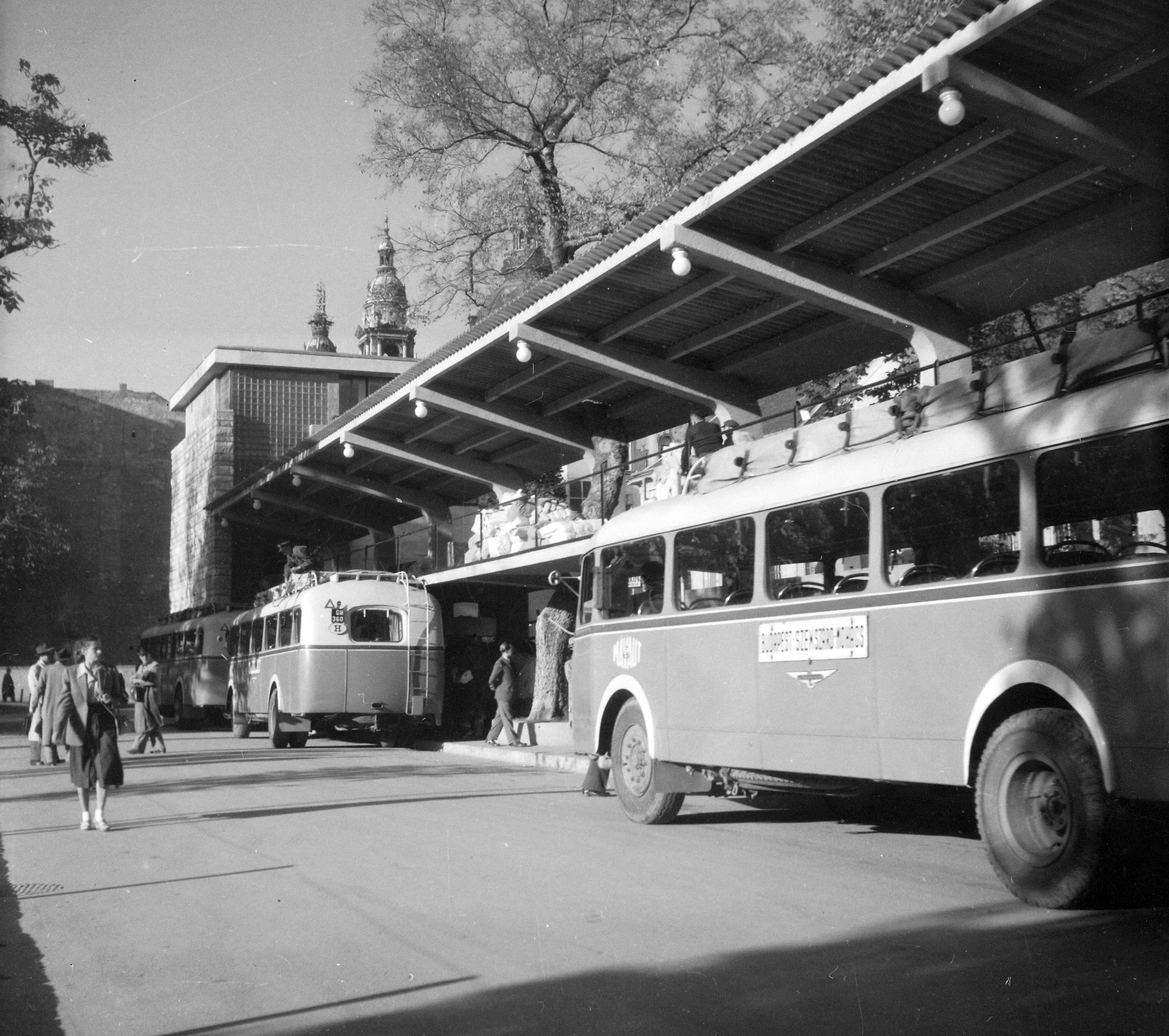 Erzsébet (Sztálin) tér, MÁVAUT autóbusz-pályaudvar. Location: Hungary, Budapest V. Tags: bus, bus terminal, destination sign, bus stop, Budapest Title: Erzsébet (Sztálin) tér, MÁVAUT autóbusz-pályaudvar.